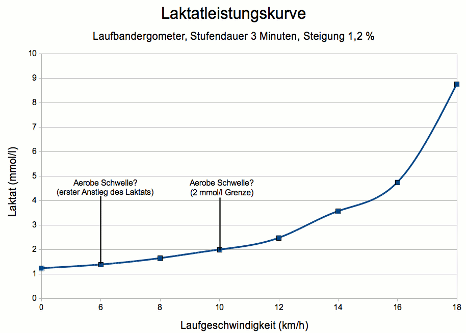 Laktatleistungskurve eines Laufband Ergometertests mit einer Stufendauer von 3 Minuten und einer Steigung von 1,2 %. Man erkennt, dass es keine klar erkennbare "Aerobe Schwelle" gibt und die Werte für die Schwelle je nach Methode weit auseinander liegen würden.